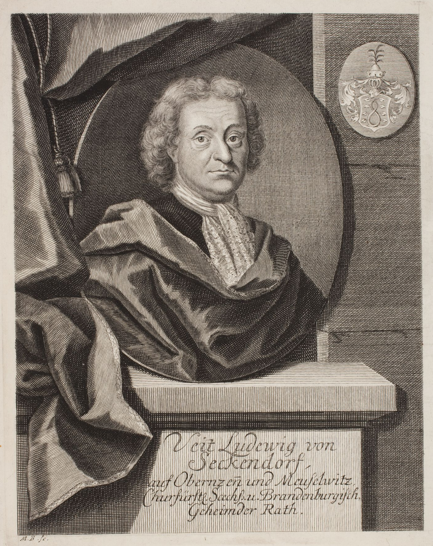 Bildnis Veit Ludwig von Seckendorff (1626-1692), Kupferstich von Martin Bernigeroth, verlegt bei Johann Friedrich Gleditsch (d. Ä.), Leipzig, 1701